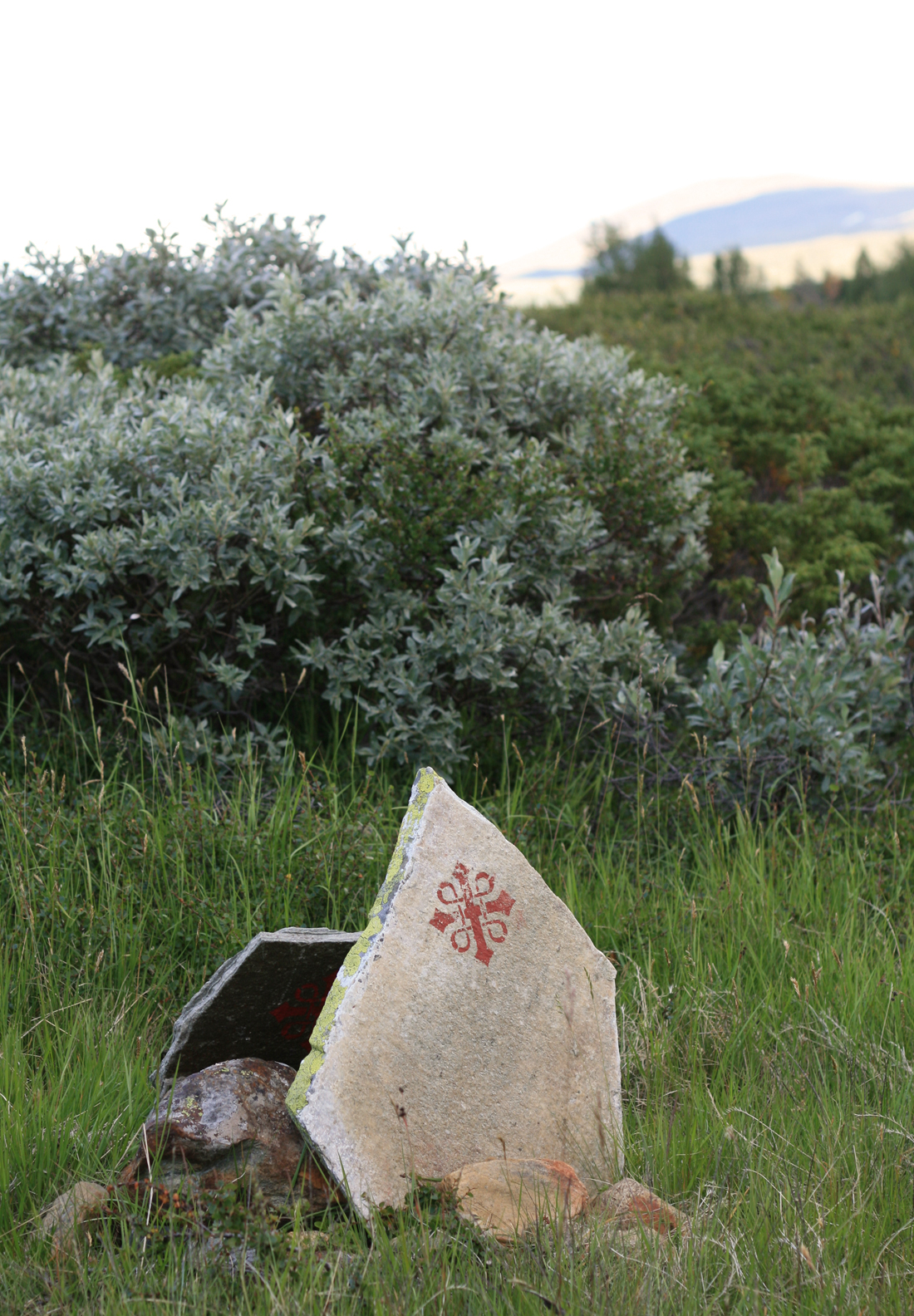 Pilgrimsleden over Dovre. Merke på skiferhelle.